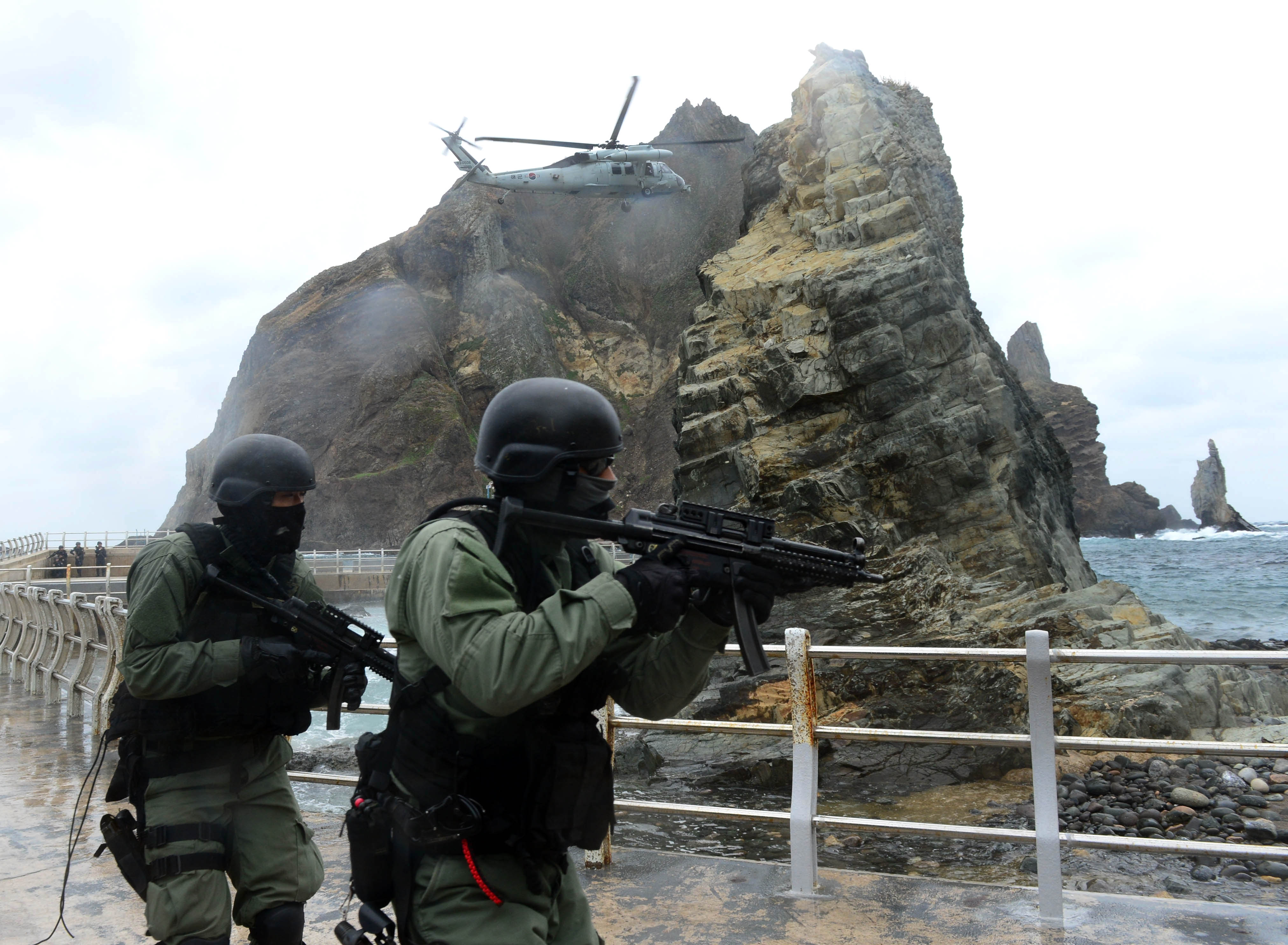 25일 오전 실시한 독도방어 훈련에서 해군 특전대대(UDT/SEAL) 및 해경 특공대 대원들이 해군 UH-60 헬기에서 강하하는 장면.(불법 상륙한 민간인 퇴거 훈련)